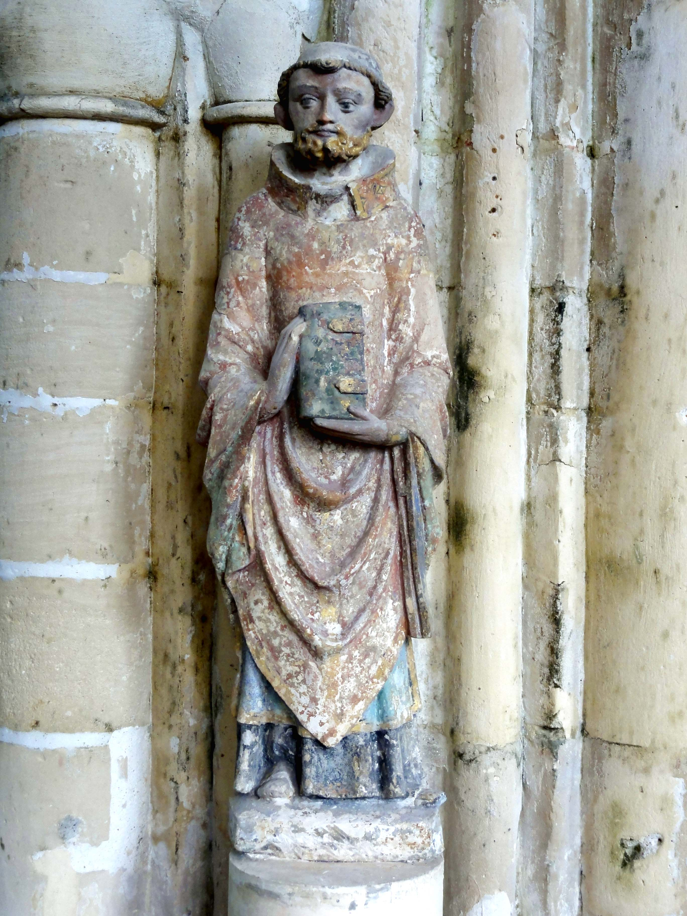 Mobilier de l'église - voir le titre du fichier.